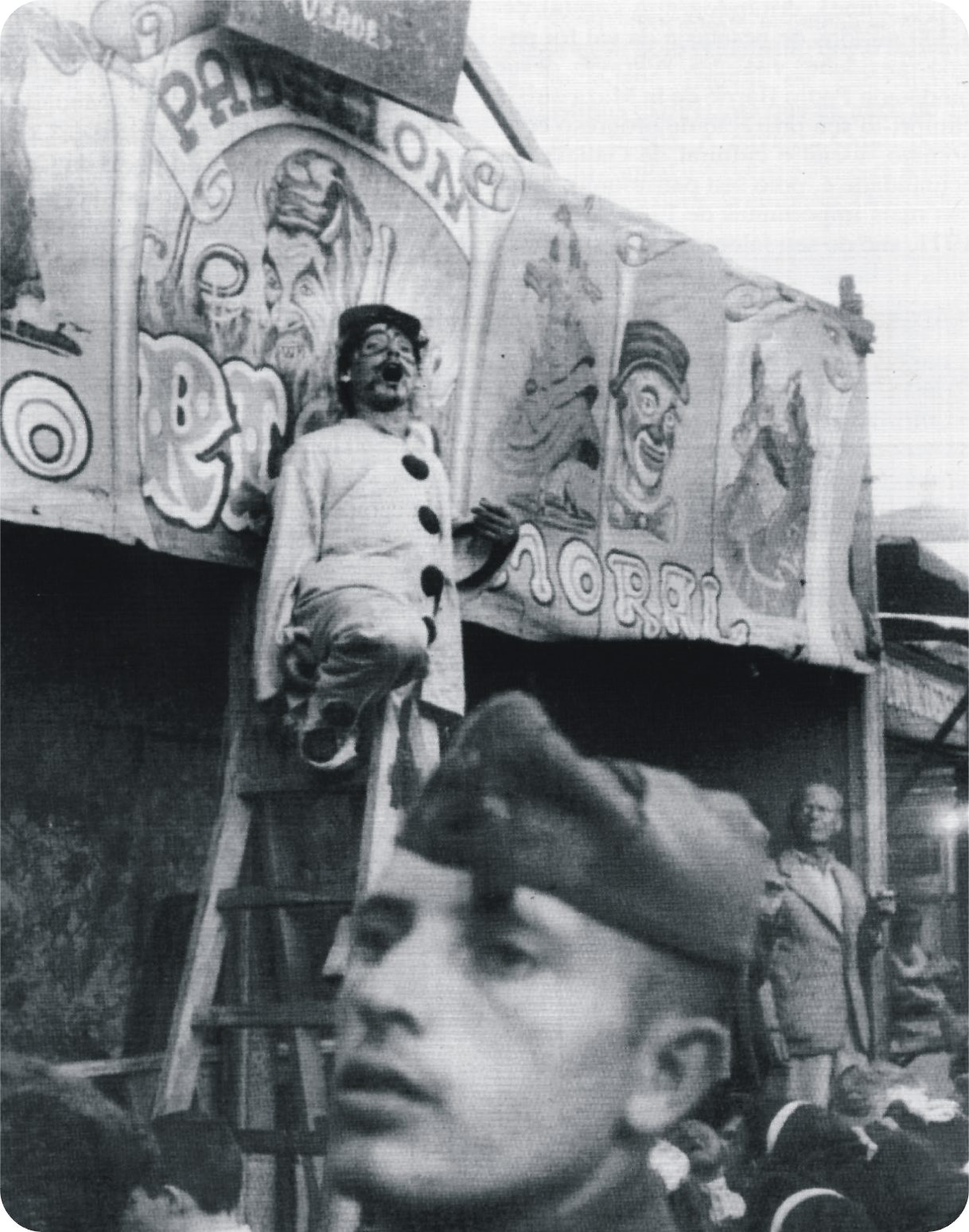 Arquivo fotográfico Independente - Jose Silvent, titiriteiro galego